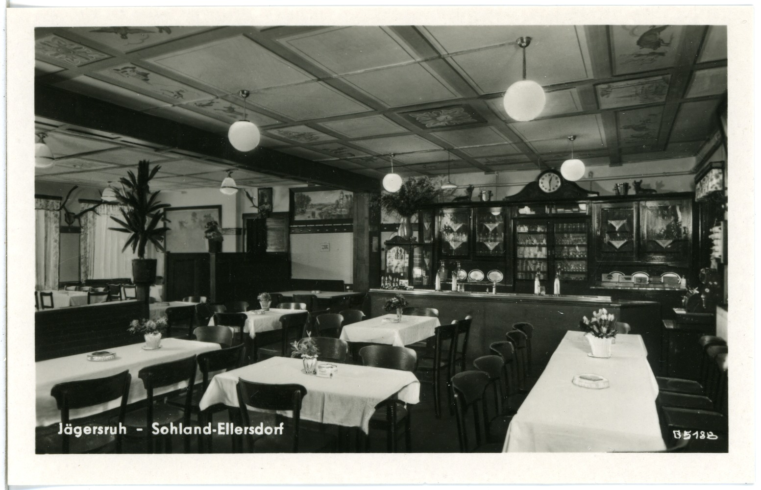 Sohland; Gasthof Jägersruh, Gastzimmer This postcard is from publisher Brück & Sohn in Meißen ( postcard has a unique number 28583 and is available in a higher resolution at the publisher. This images was uploaded in a cooperation project between Wikipedians and the publisher.